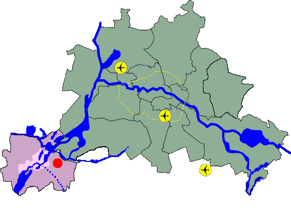 Lage Potsdam-Babelsberg bei Berlin